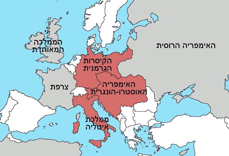 Triple Alliance